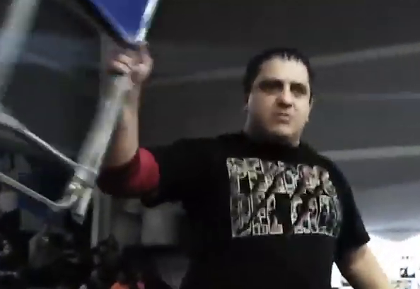 Joe Líder en 2019 à Jalisco au Mexique